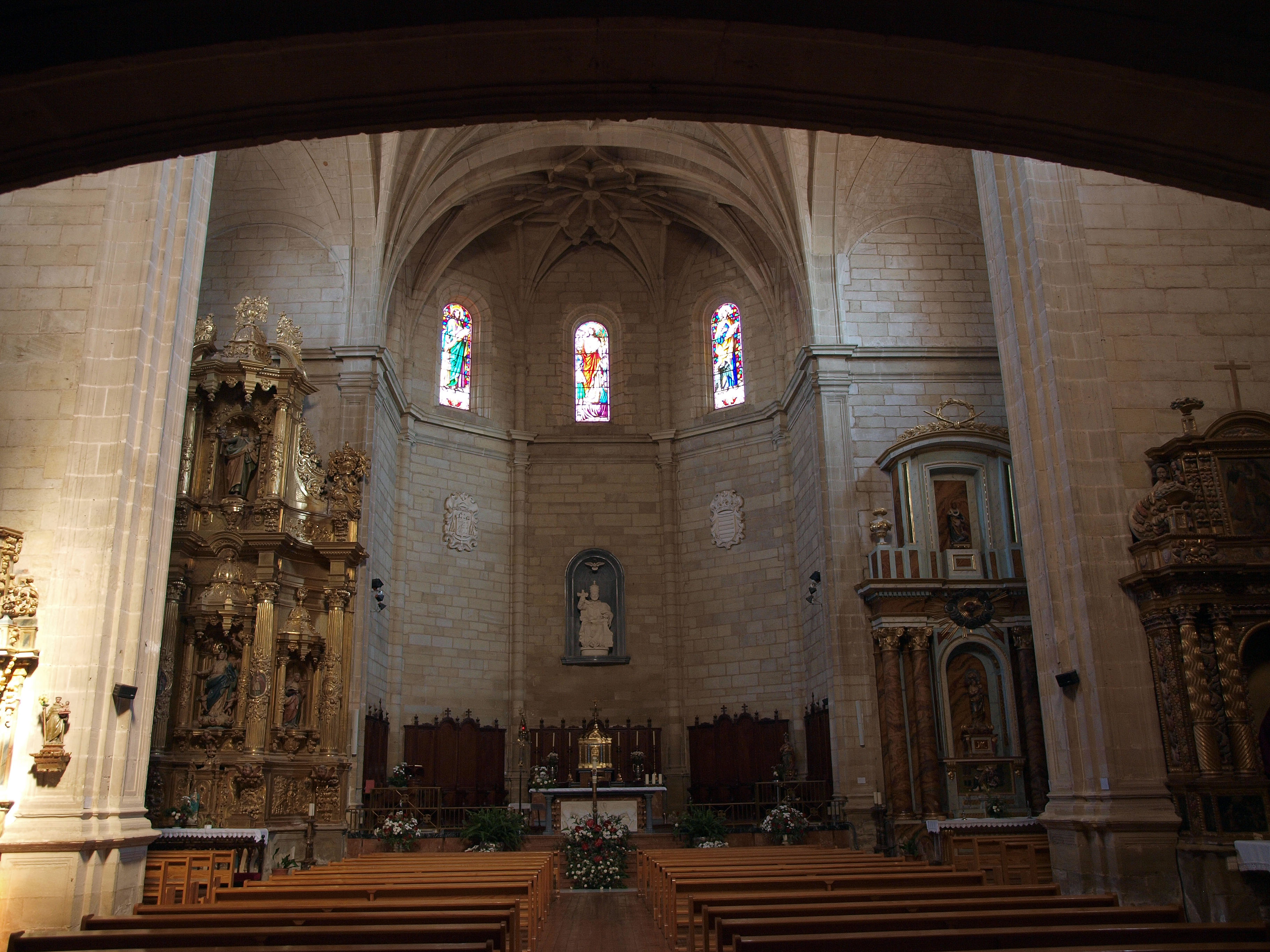 Interior de la iglesia de Huércanos (La Rioja, España)